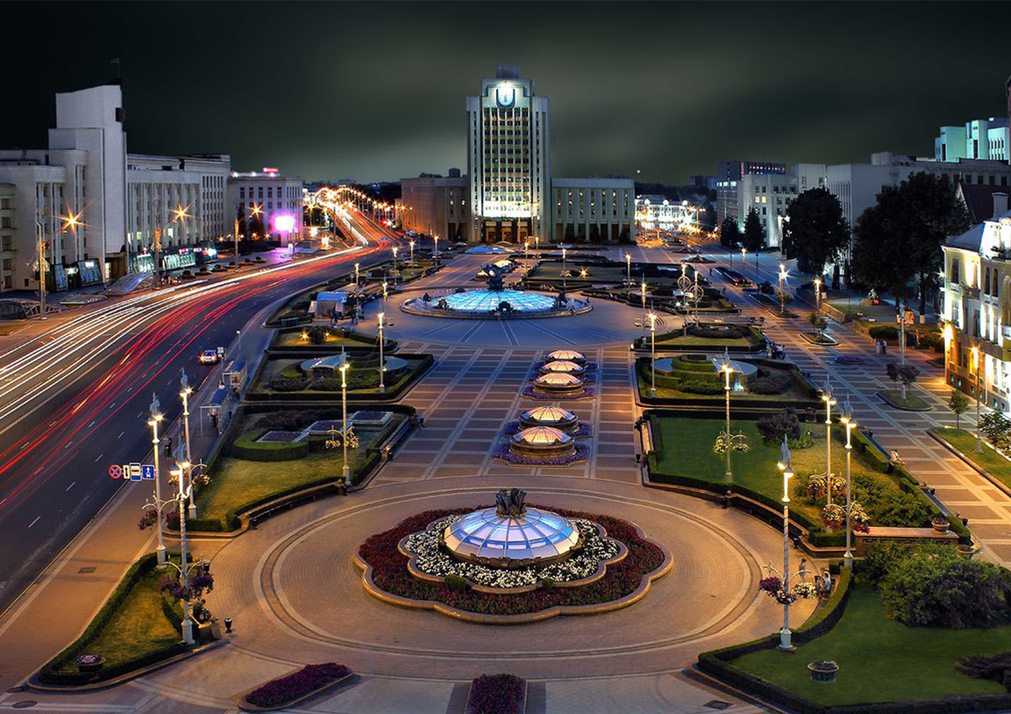 Вид БГПУ